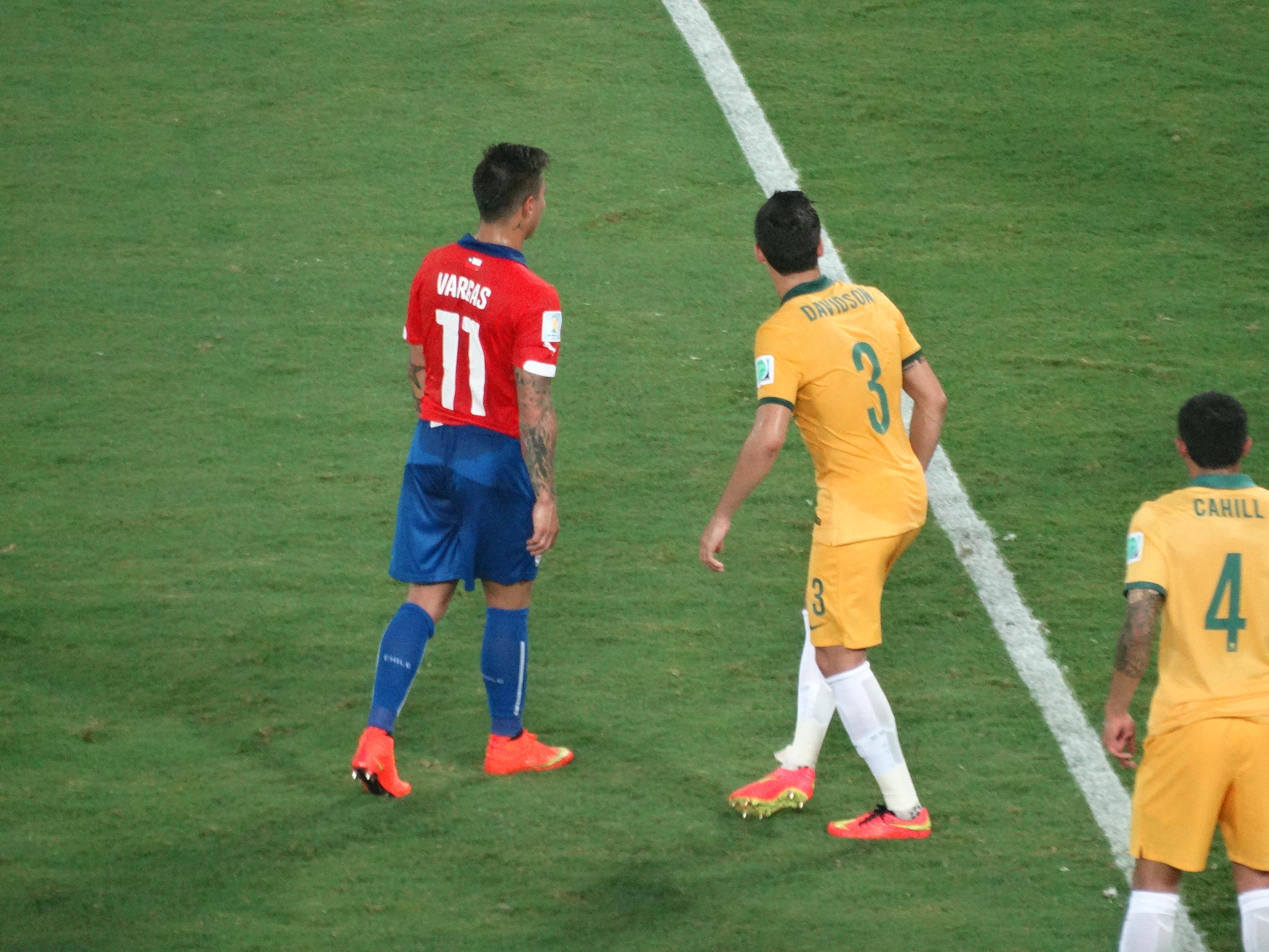 Eduardo Vargas en un partido frente a la Selección de Fútbol de Australia, válido por la Fase de Grupos de la Copa Mundial de Fútbol de 2014.